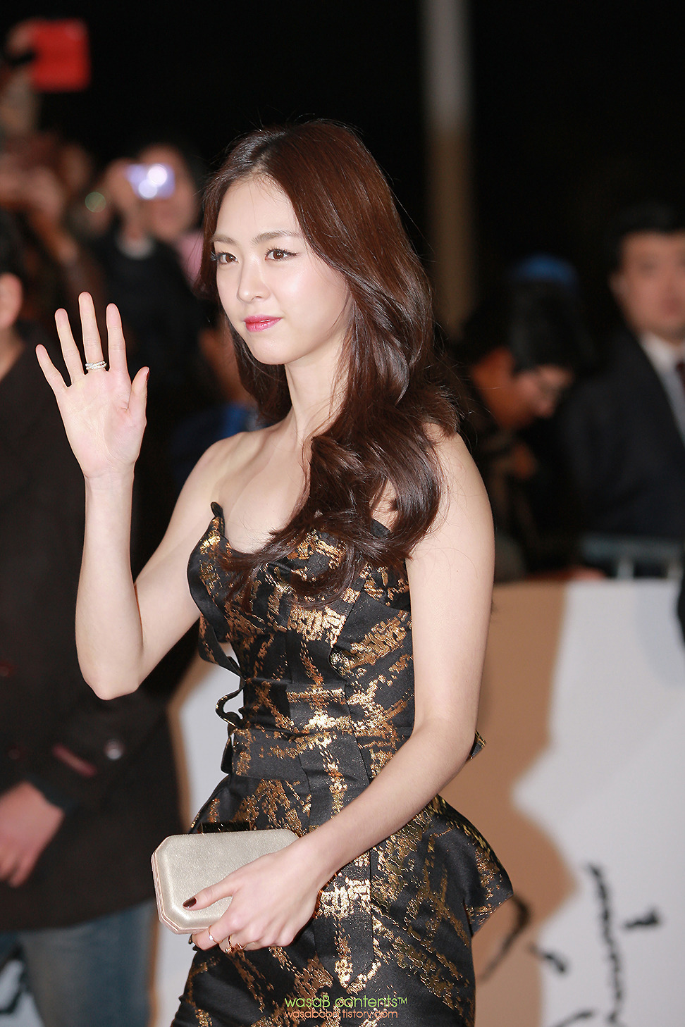 2013 청룡영화제